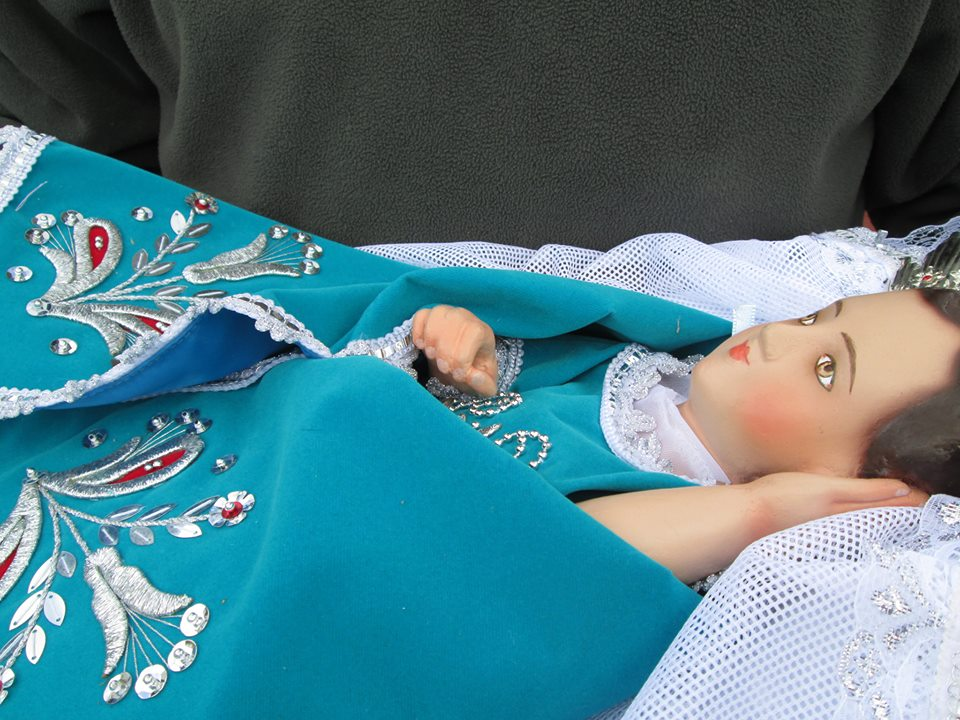 Dolnoserbski: Niño Jesús de Navidad Huancaray 25 de Diciembre... Fiesta Tradicional.